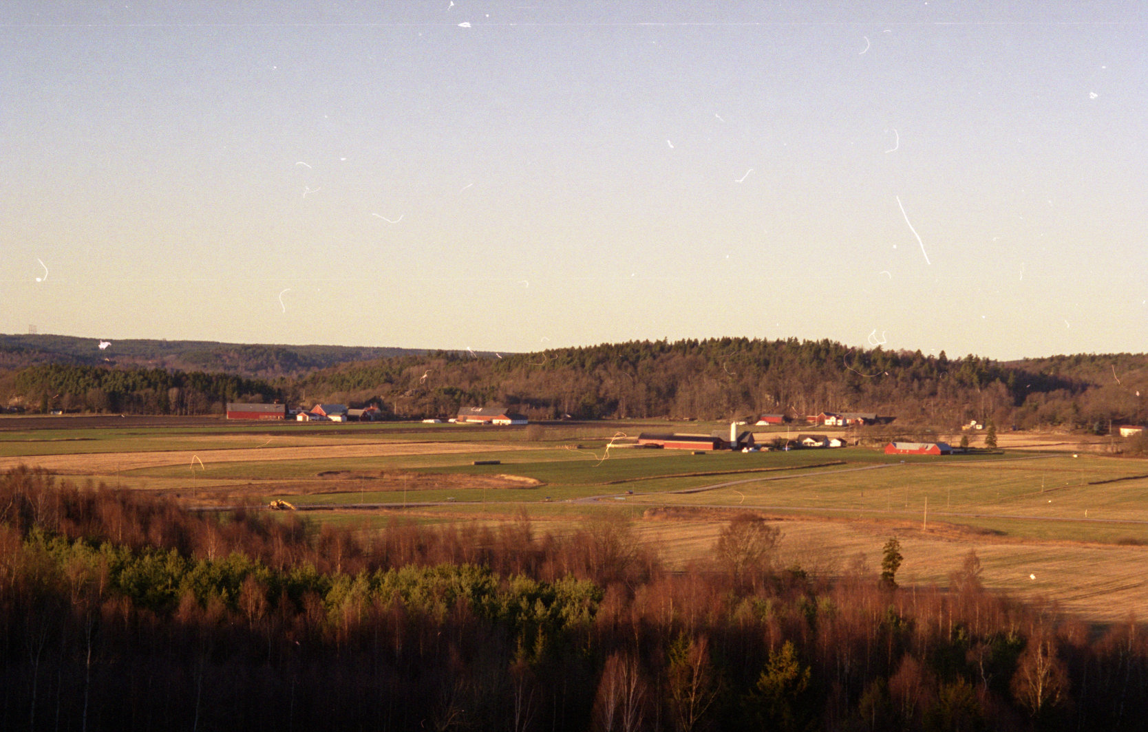 Vy över Sällstorpsslätten mot Veddige. Datun för fotot är osäkert men bör vara inom två år från angivet.